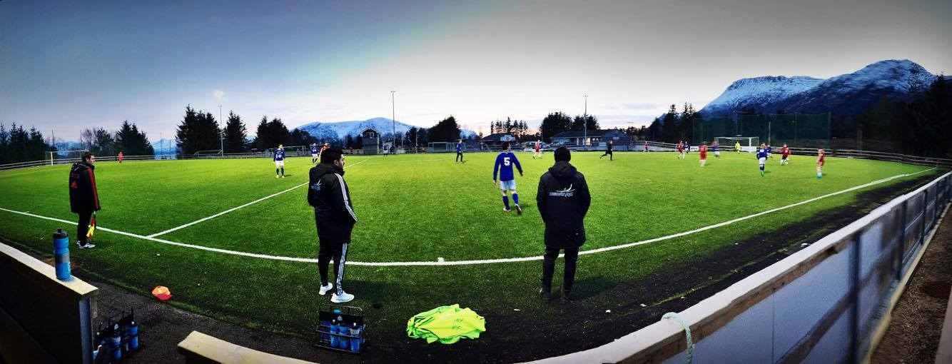 Godøy vs. Valder, treningskamp, mars 2016.